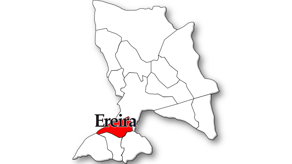 População